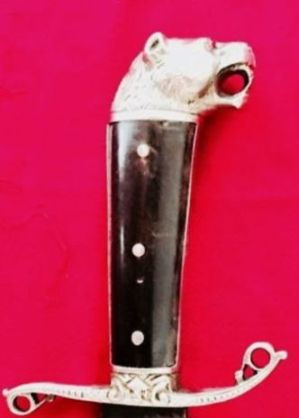 Espada del General Eduardo Pérez Fabelo, líder republicano del Estado Zulia, Venezuela. Detalle de la empuñadura